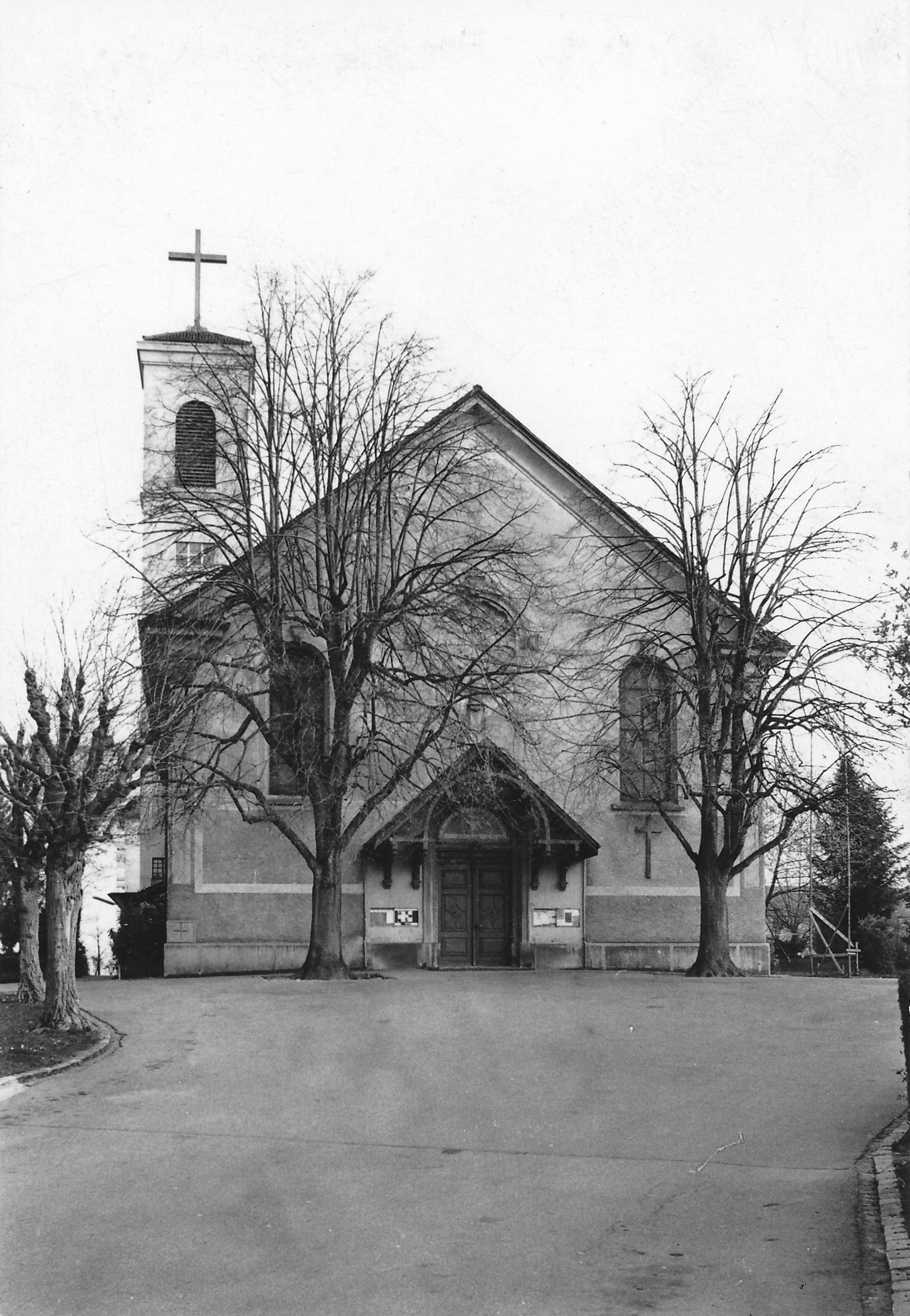 Römisch-katholische Pfarrei Heilig Kreuz Zürich-Altstetten, Ansicht der alten Kirche von Osten